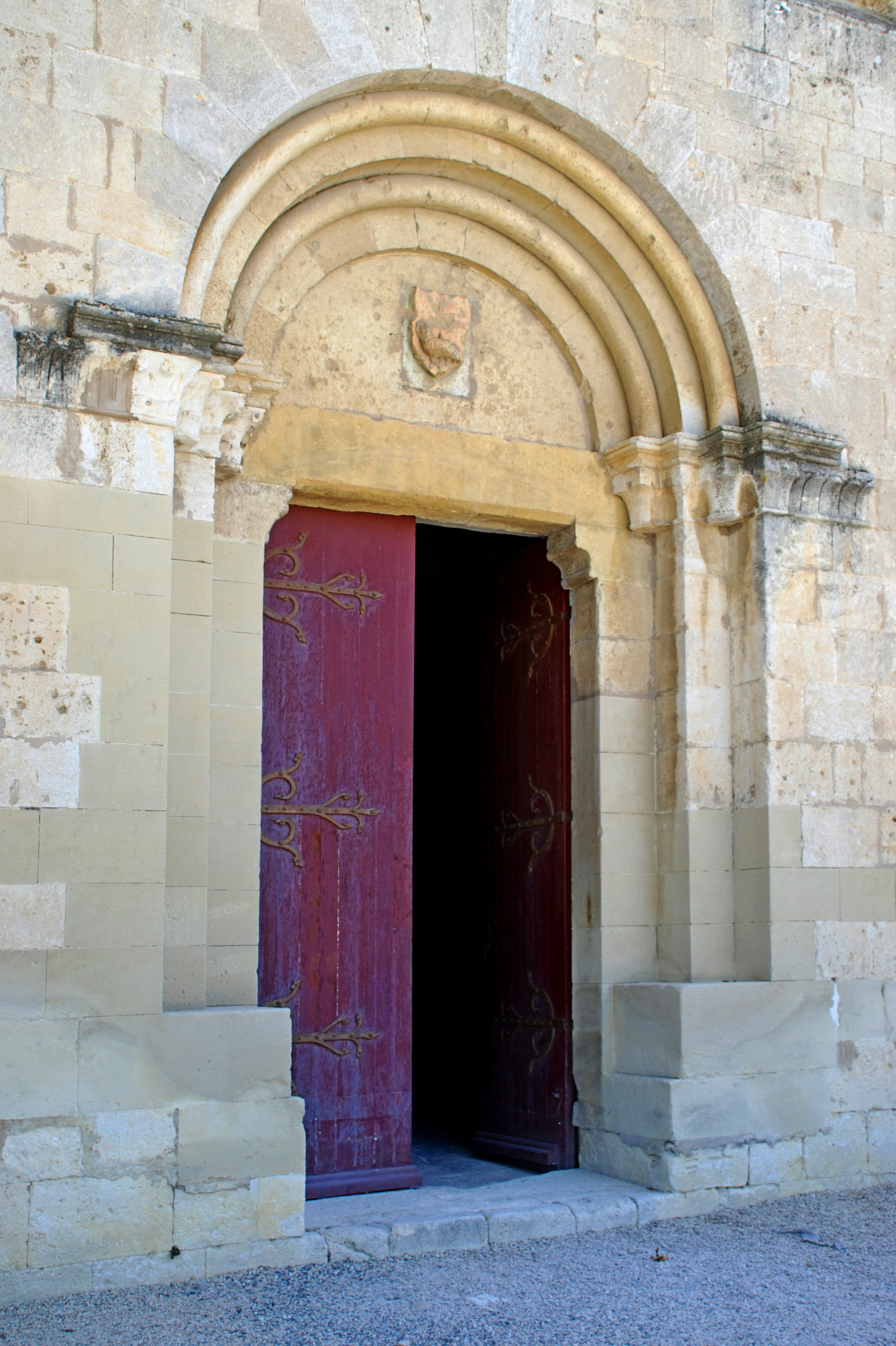 France - Provence - Abbaye de Silvacane